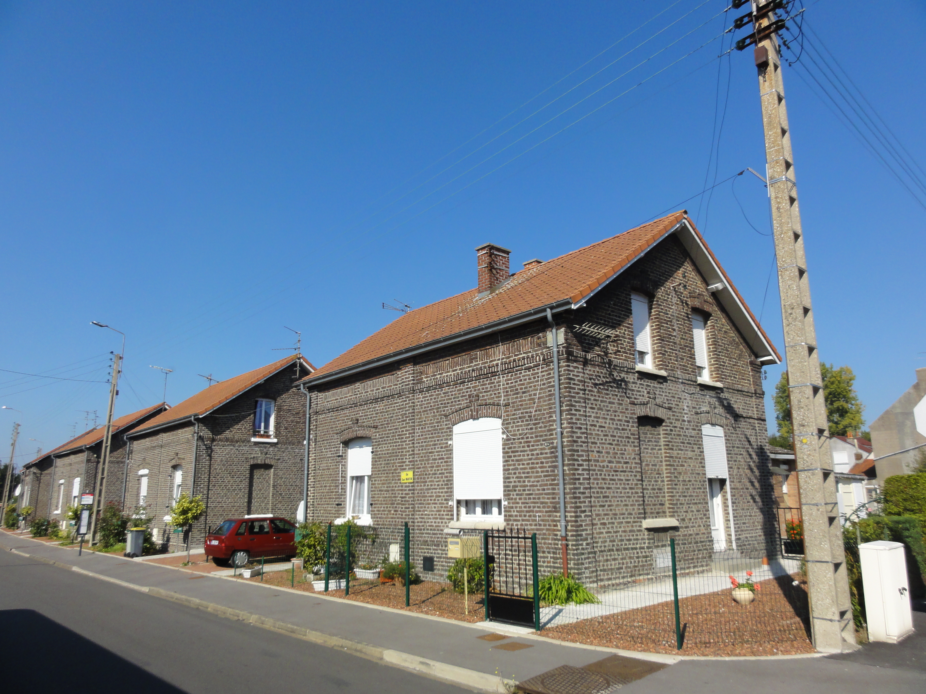 Cités de la Fosse Trou Martin de la Compagnie des mines d'Anzin, Vieux-Condé, Nord, Nord-Pas-de-Calais, France.